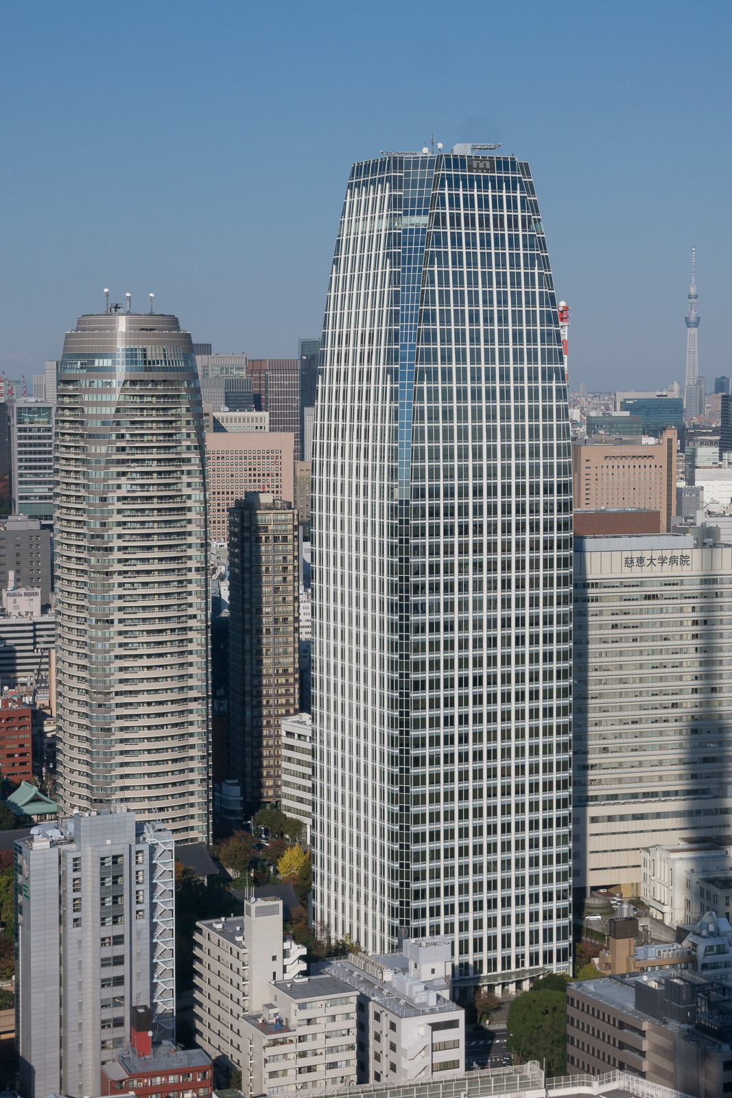 愛宕グリーンヒルズ、東京都港区愛宕。